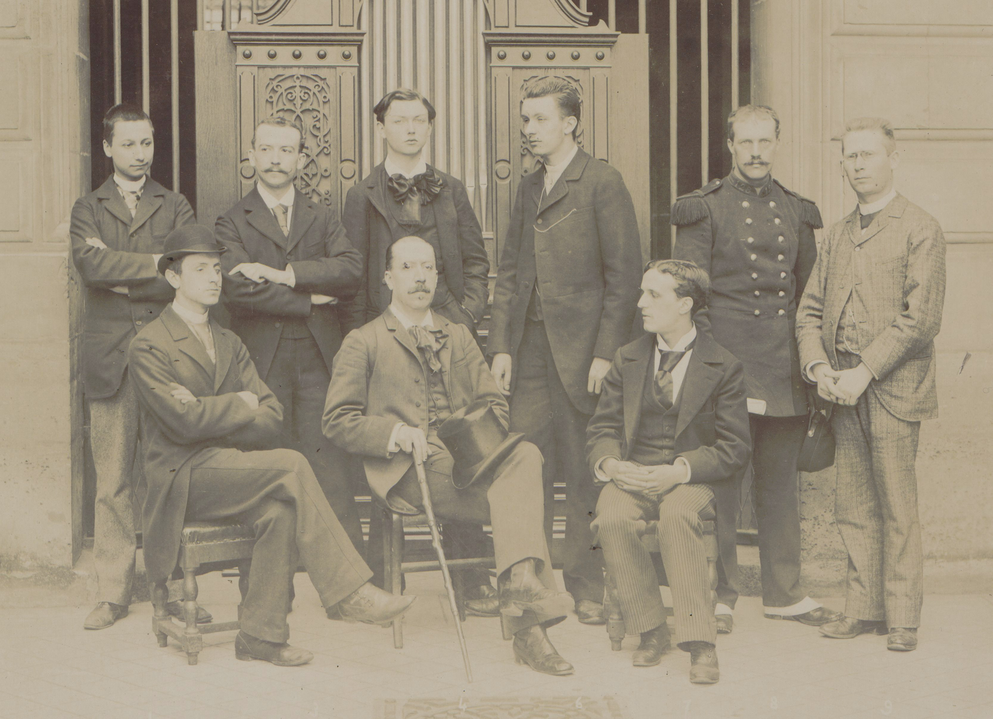 Centenaire du Conservatoire national de musique et de déclamation de Paris (1795-1895). Photographie de la classe d'orgue de Charles-Marie Widor avec Louis Vierne, assistant.